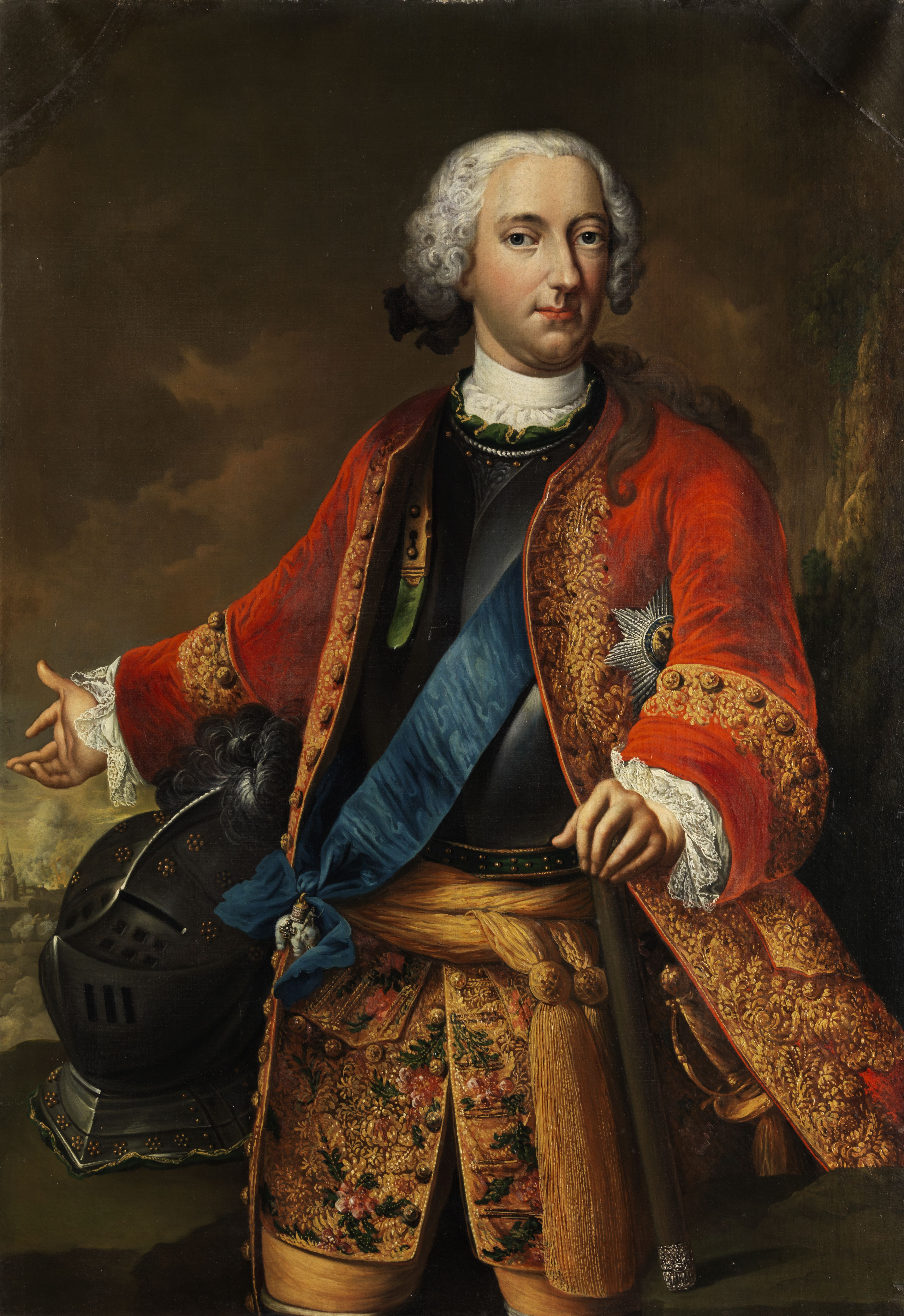 Portraitbildnis Karl I. Herzog von Braunschweig-Wolfenbüttel (1713–1780)